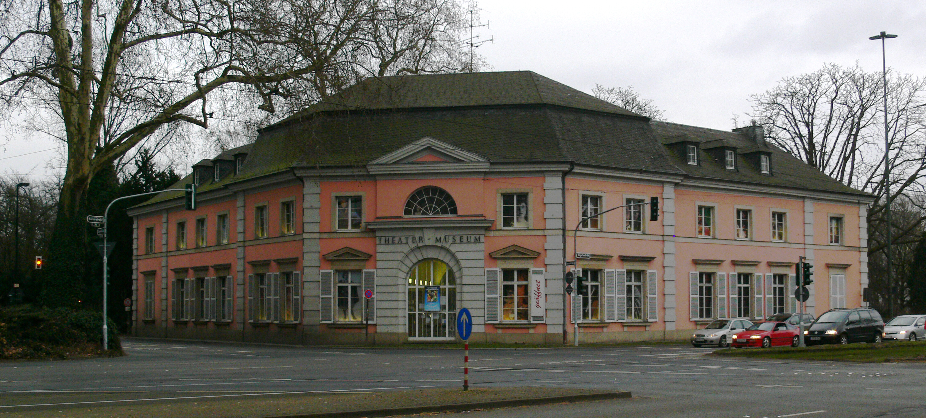 Theatermuseum Düsseldorf, ehem. Hofgärtnerhaus